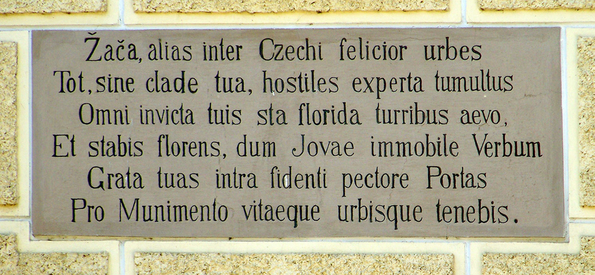 Oslavní baseň Jiřího Carolidese z Karlsperka